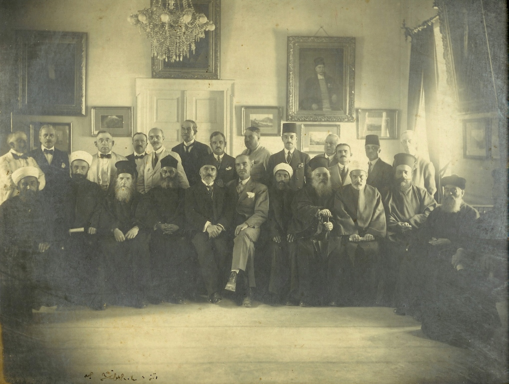 Şevket Dağdeviren Edirne Belediye başkanı iken. Cem Altınel özel koleksiyonundan.